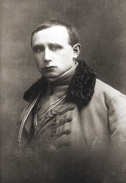 Ksiądz kapelan Józef Panaś podczas kampanii na Wołyniu, w końcu 1915 lub na początku 1916 r.